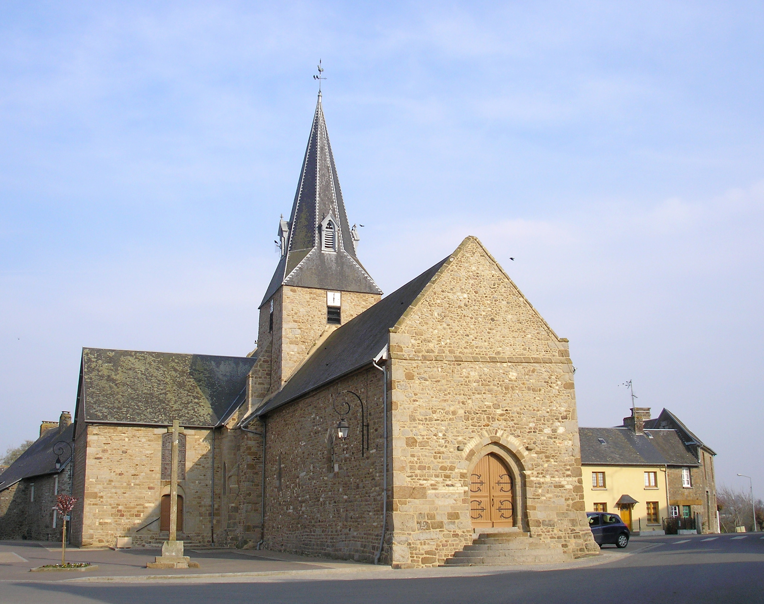 Saint-Cyr-du-Bailleul (Normandie, France). L'église Saint-Cyr-et-Sainte-Juliette.